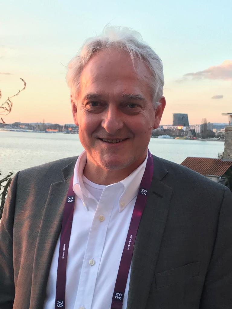 Das Bild von Aleksander Berentsen wurde am 25.03.2019 von mir persönlich in Zug (Schweiz) für die Verwendung bei der Wikipedia freie Enzyklopedie erstellt.